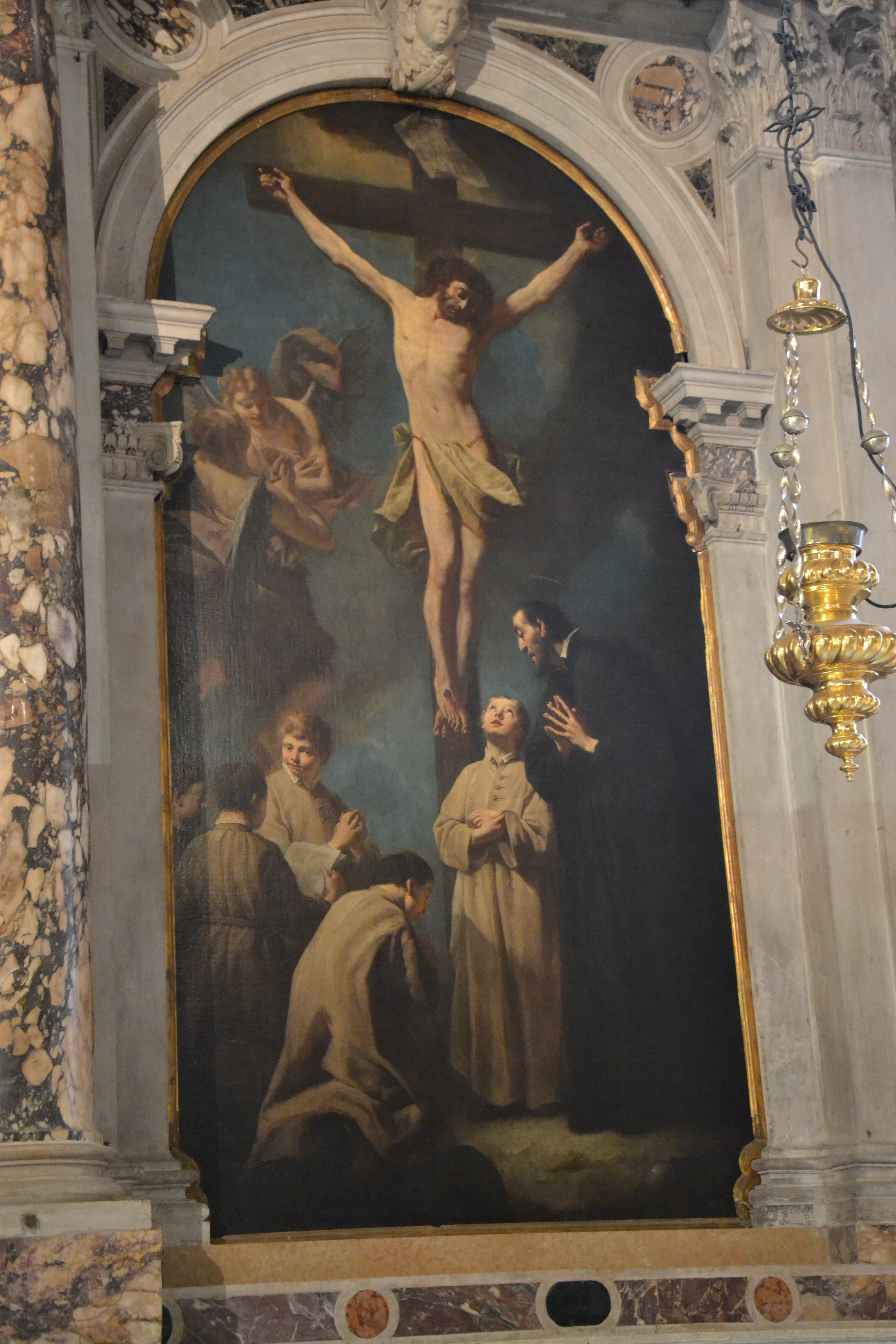 Giuseppe Angeli, Cristo in croce e San Girolamo Miani con alcuni orfanelli, Santa Maria dei Derelitti (Venezia), vulgo dell’Ospedaletto